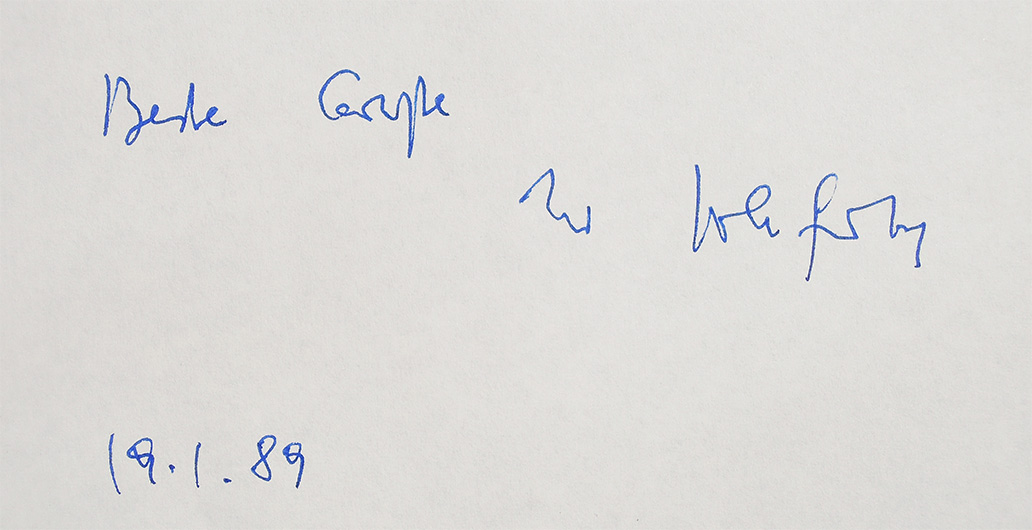 Beste Grüße